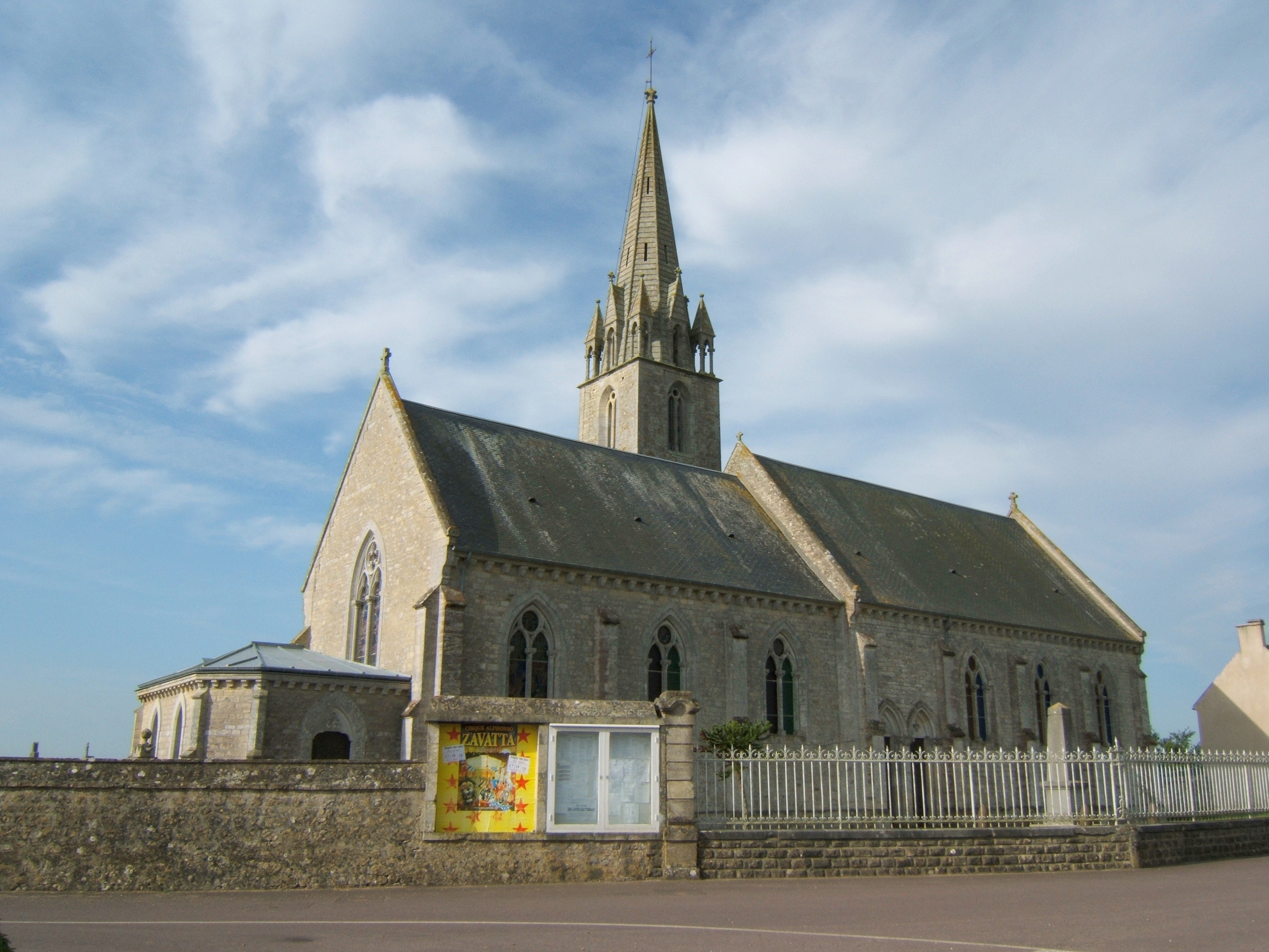 L'église de Monfréville (Calvados) dans le parc des marais du Cotentin et du Bessin.